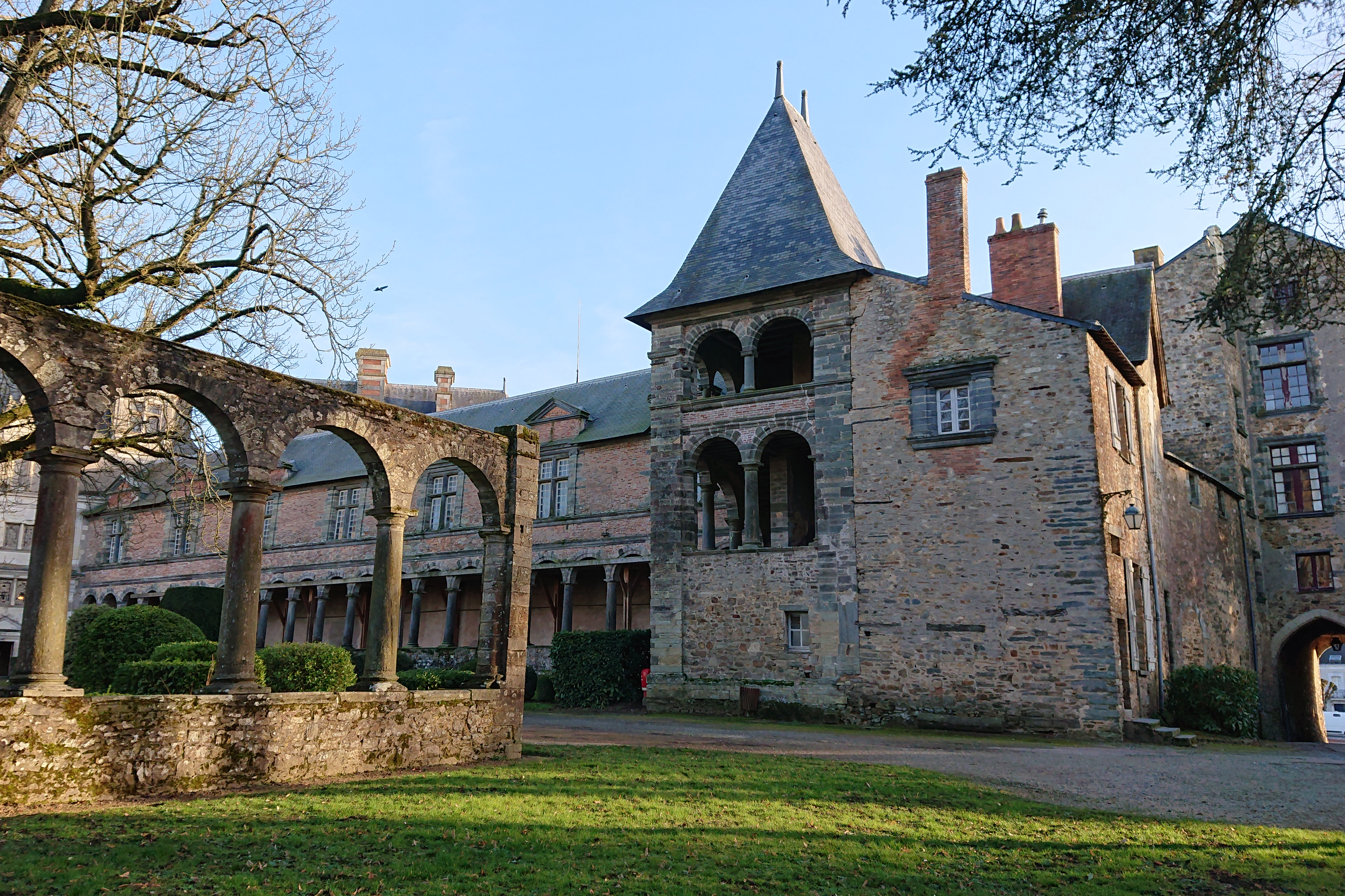 Ruines de l'ancienne galerie ouest du Château de Châteaubriant, France.